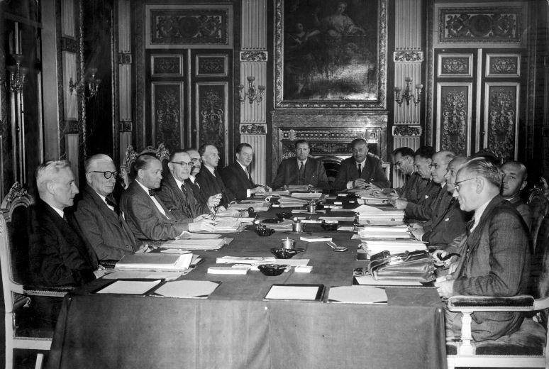 Waarschijnlijk laatste zitting van het demissionaire kabinet Drees in de Treveszaal op het Binnenhof te Den Haag, 18 augustus 1952.Links voor minister Joekes